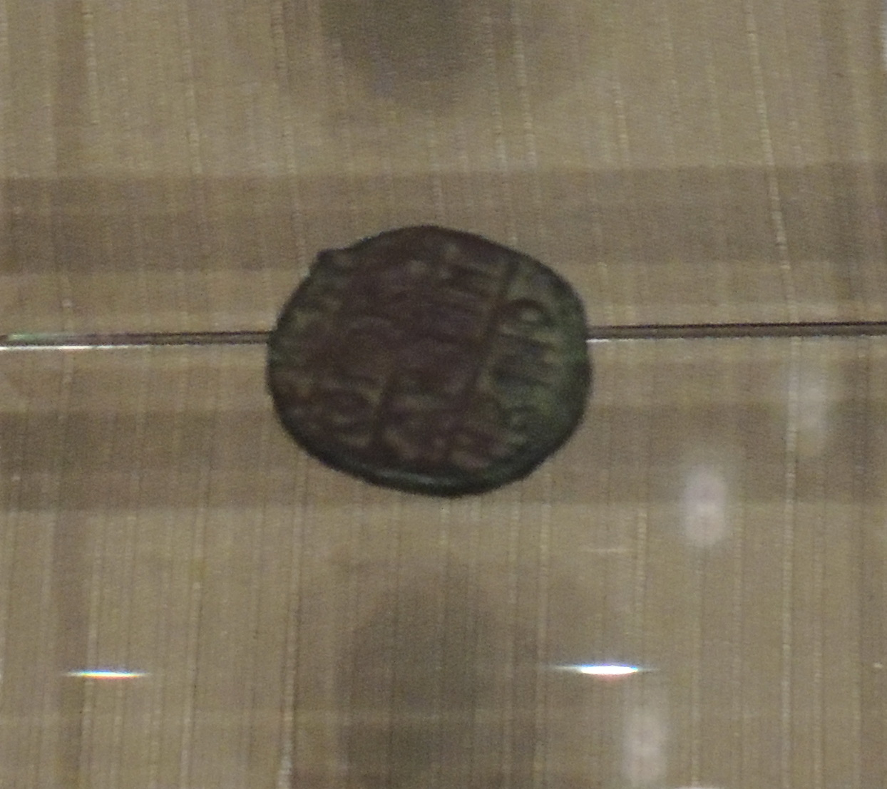 Выставка "Великий князь и государь всея Руси Иван III" Пуло, Тверь, 1495-90. На обороте медного пуло прочеканено имя старшего сына Ивана III как "Великий князь Иван Иванович"